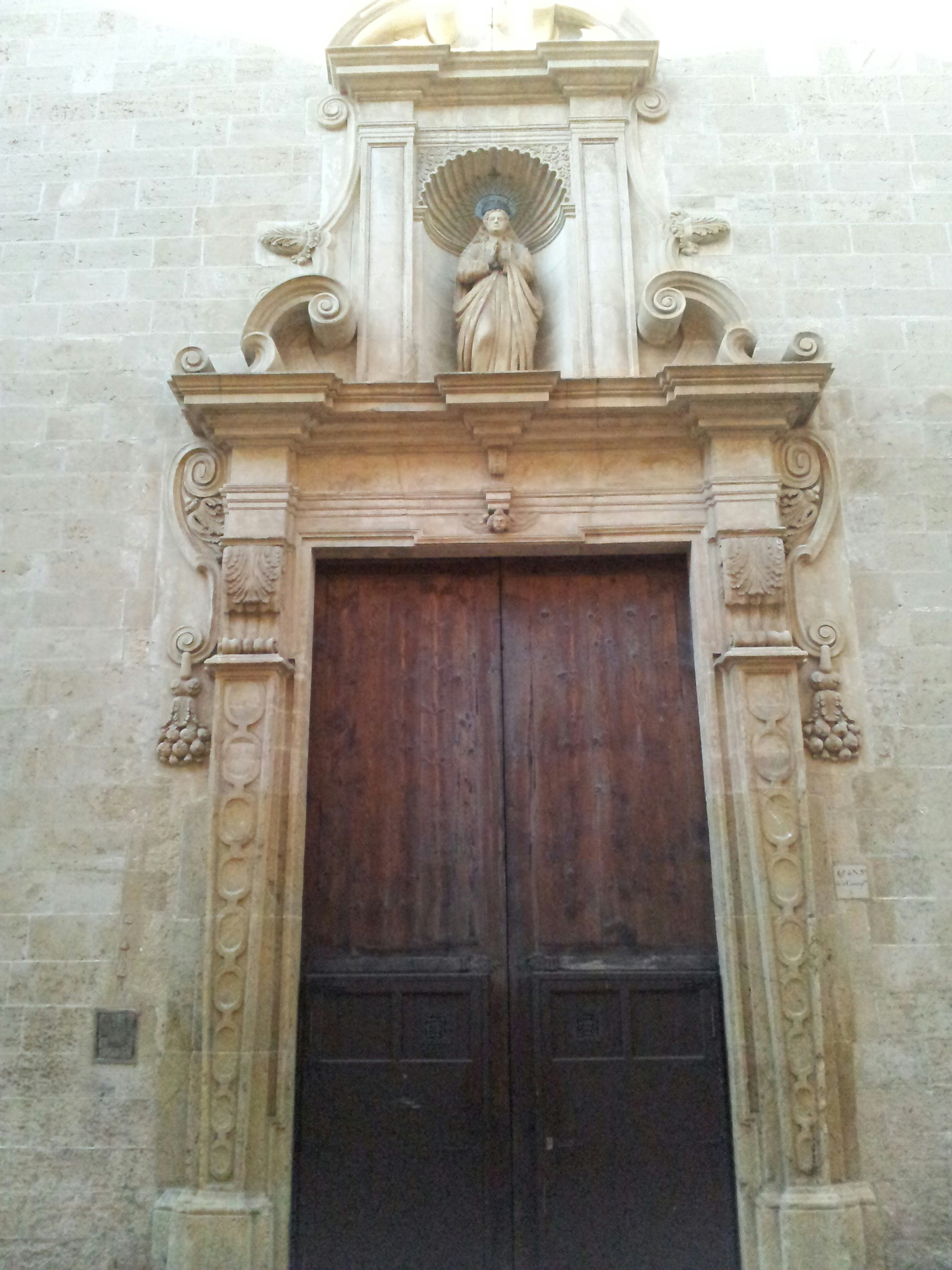 Església i monestir de la Concepció (Palma)